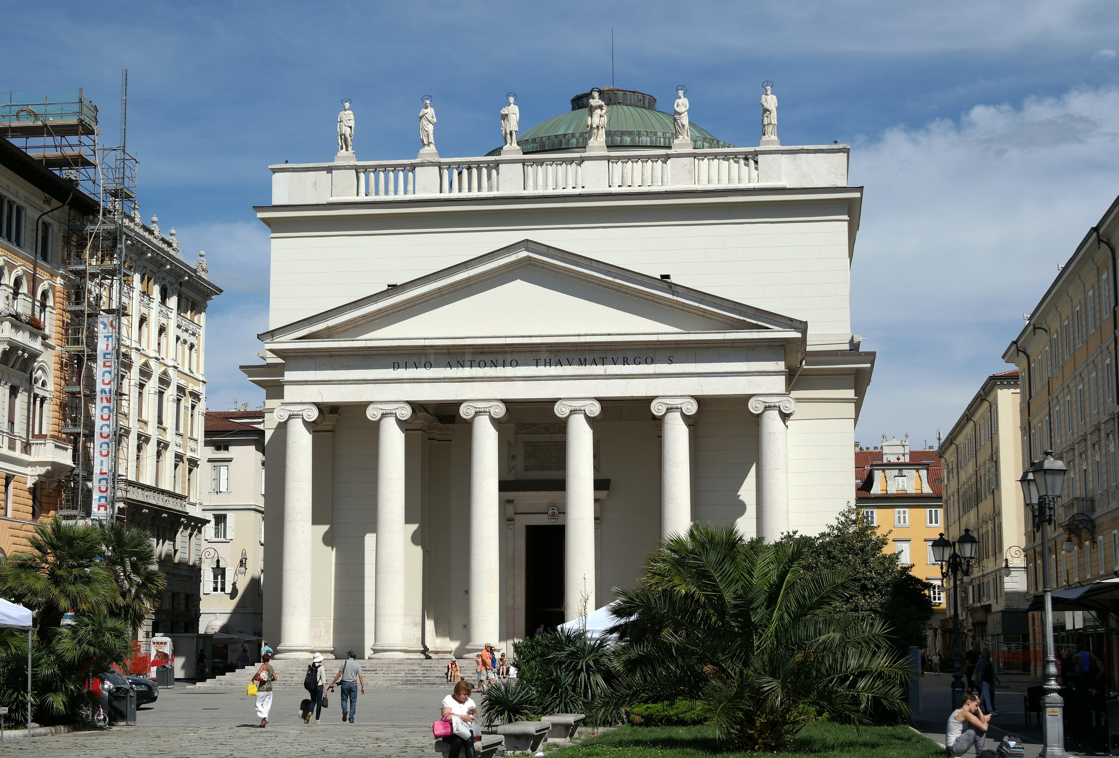 Chiesa di Sant'Antonio Taumaturgo a Trieste